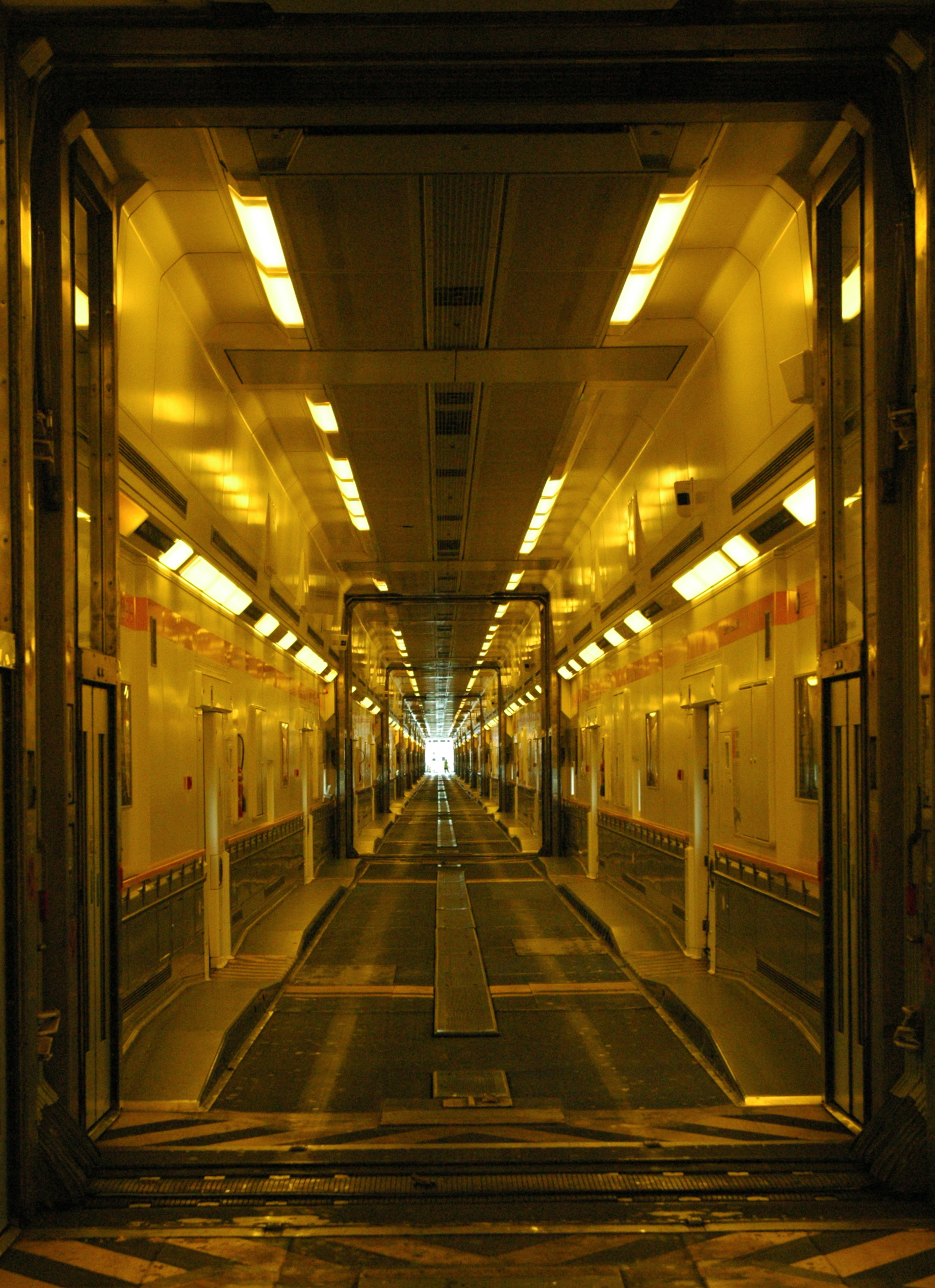 Eurotúnel, tomada desde el interior de un tren.